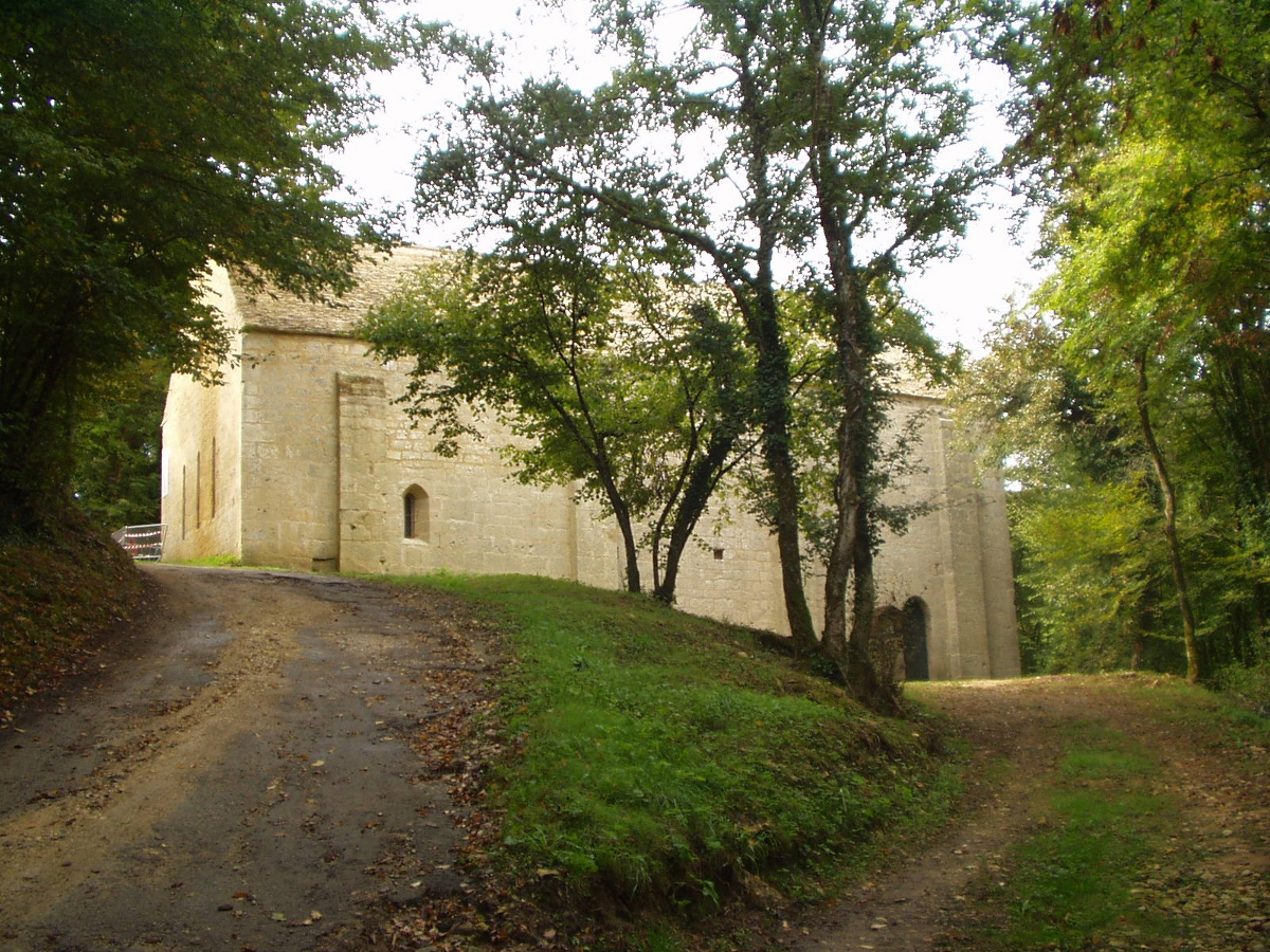 Eglise de Redon Espic à Castels (Dordogne)